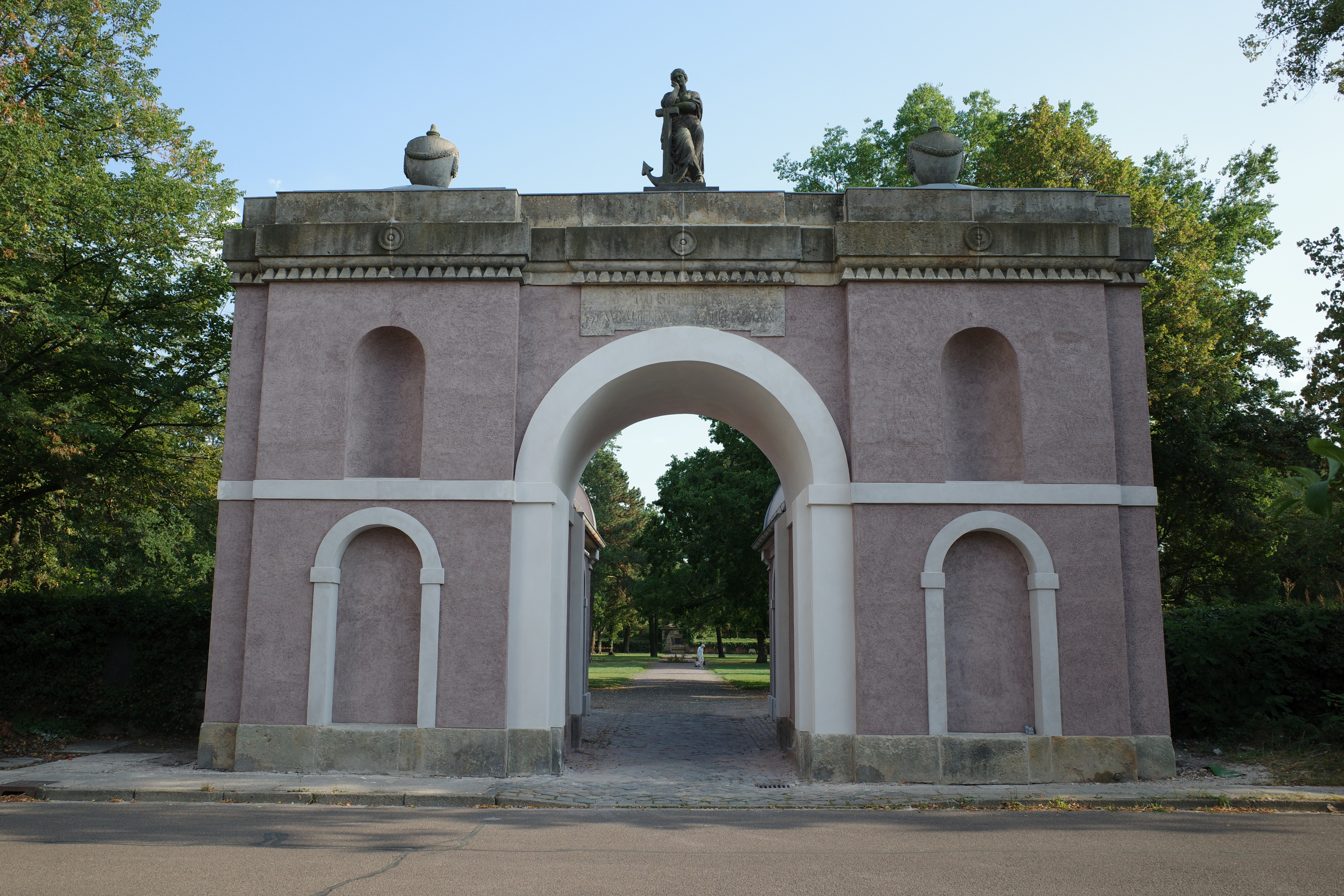 Dessau, Neuer Begräbnisplatz Dessau, das sanierte Nordtor, Haupteingang an der Chaponstraße.